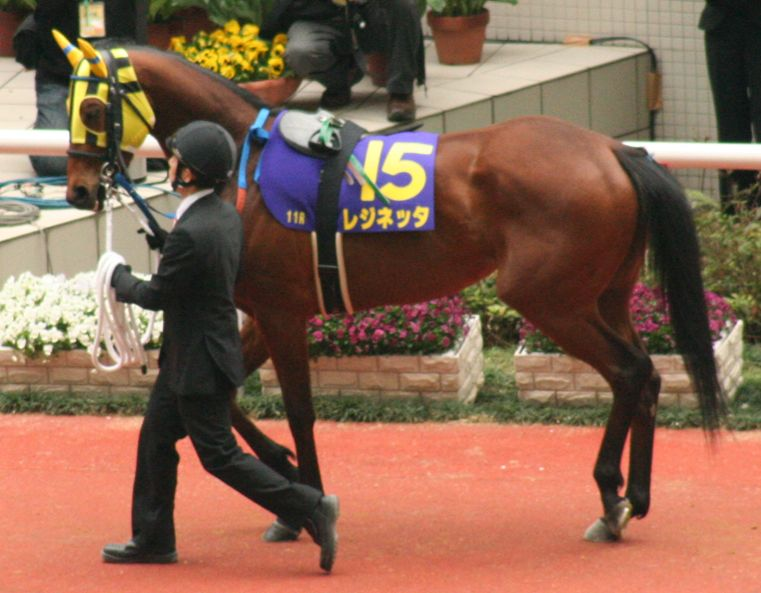 レジネッタ (Reginetta)